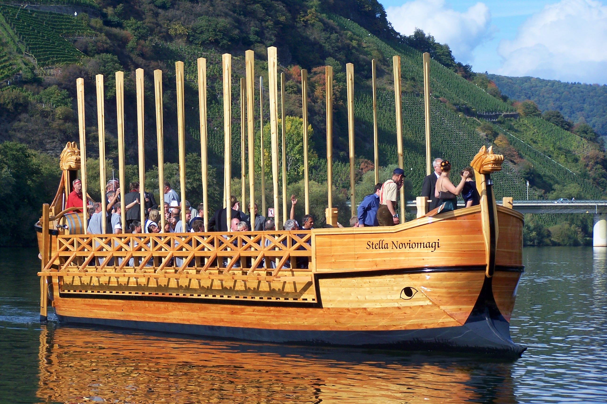 Nachbau des Neumagener-Weinschiffs. Die Stella Noviomagi kurz vor ihrer Ankunft im neuen Hafen.